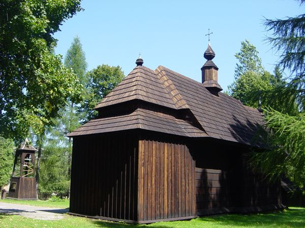 Ustjanowa Górna - cerkiew